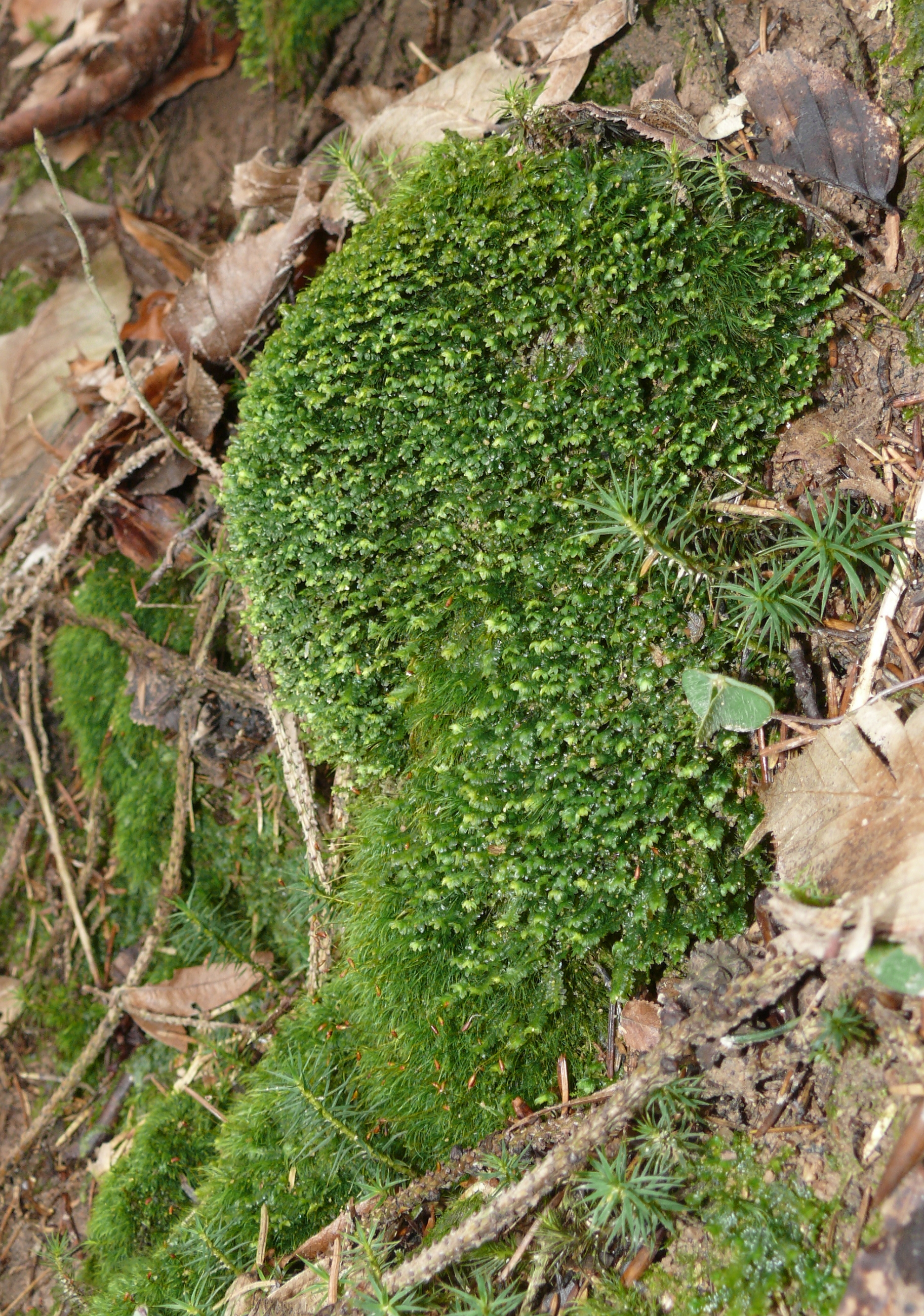 Diplophyllum albicans, Schwäbisch-Fränkische Waldberge, Germany